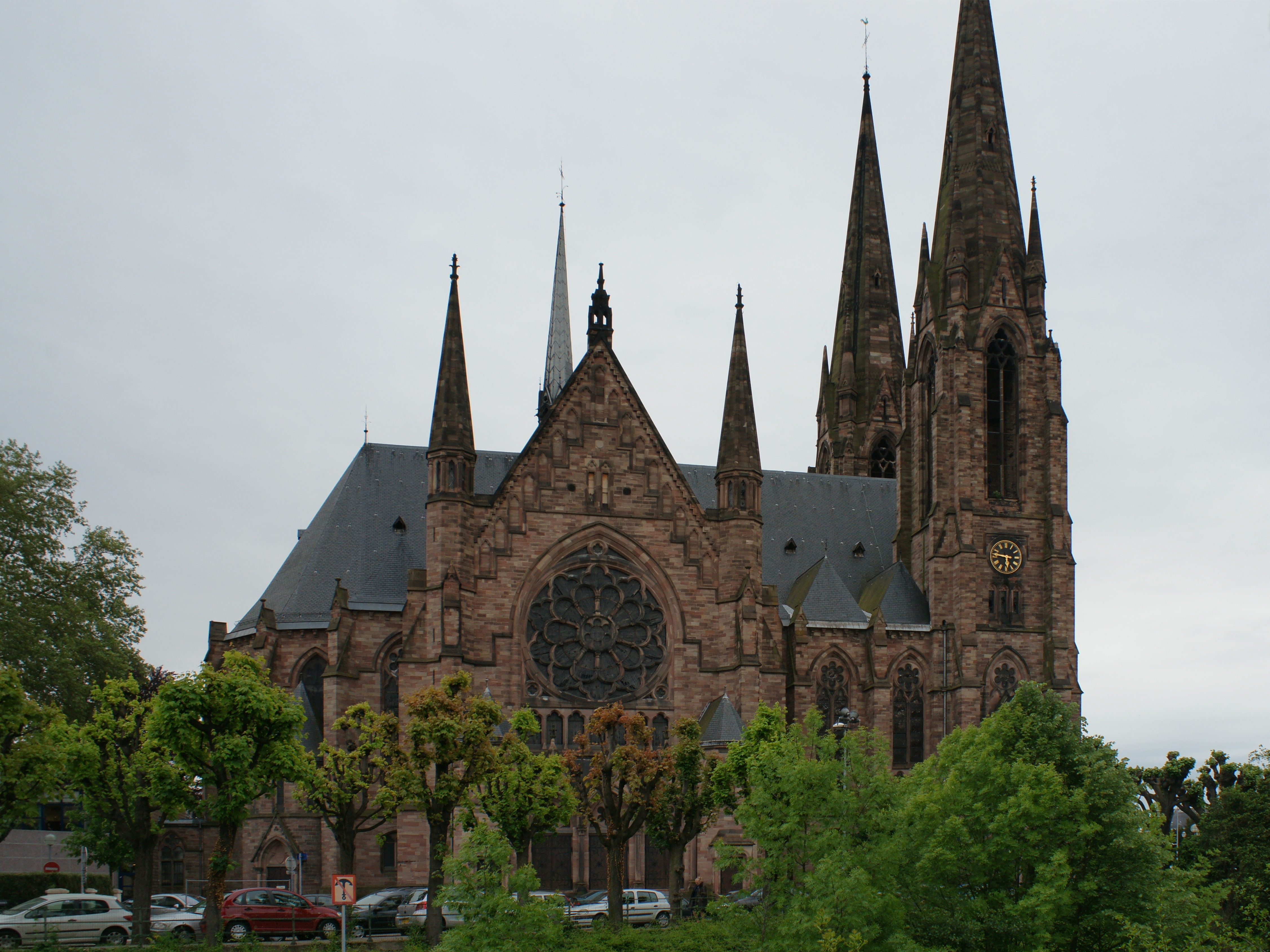 Saint-Paul de Strasbourg lateral view